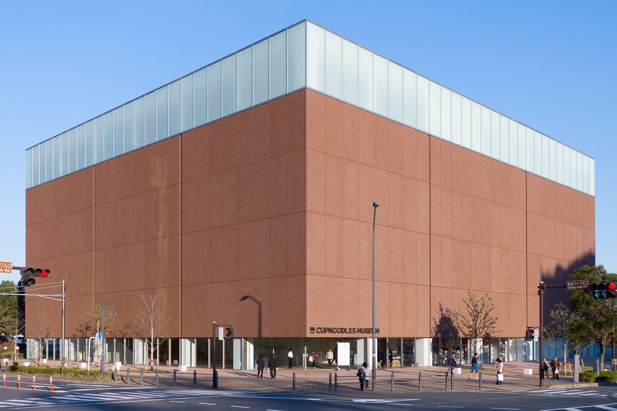 日清食品の運営する「カップヌードルミュージアム」、横浜市中区新港2丁目。